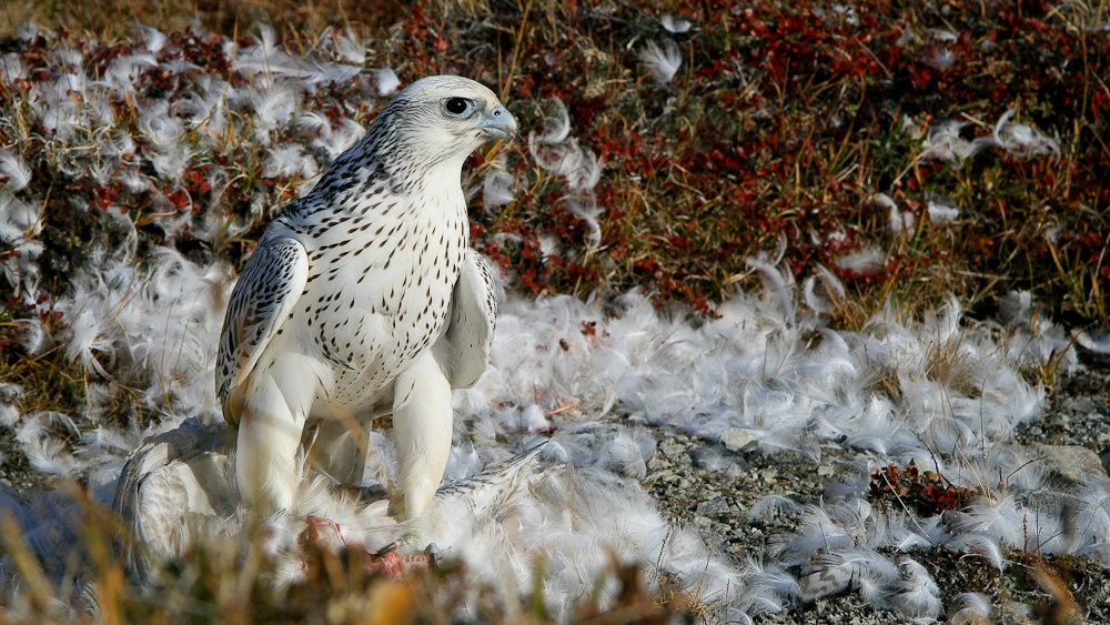 Gerfalke (Falco rusticolus) in Westgrönland